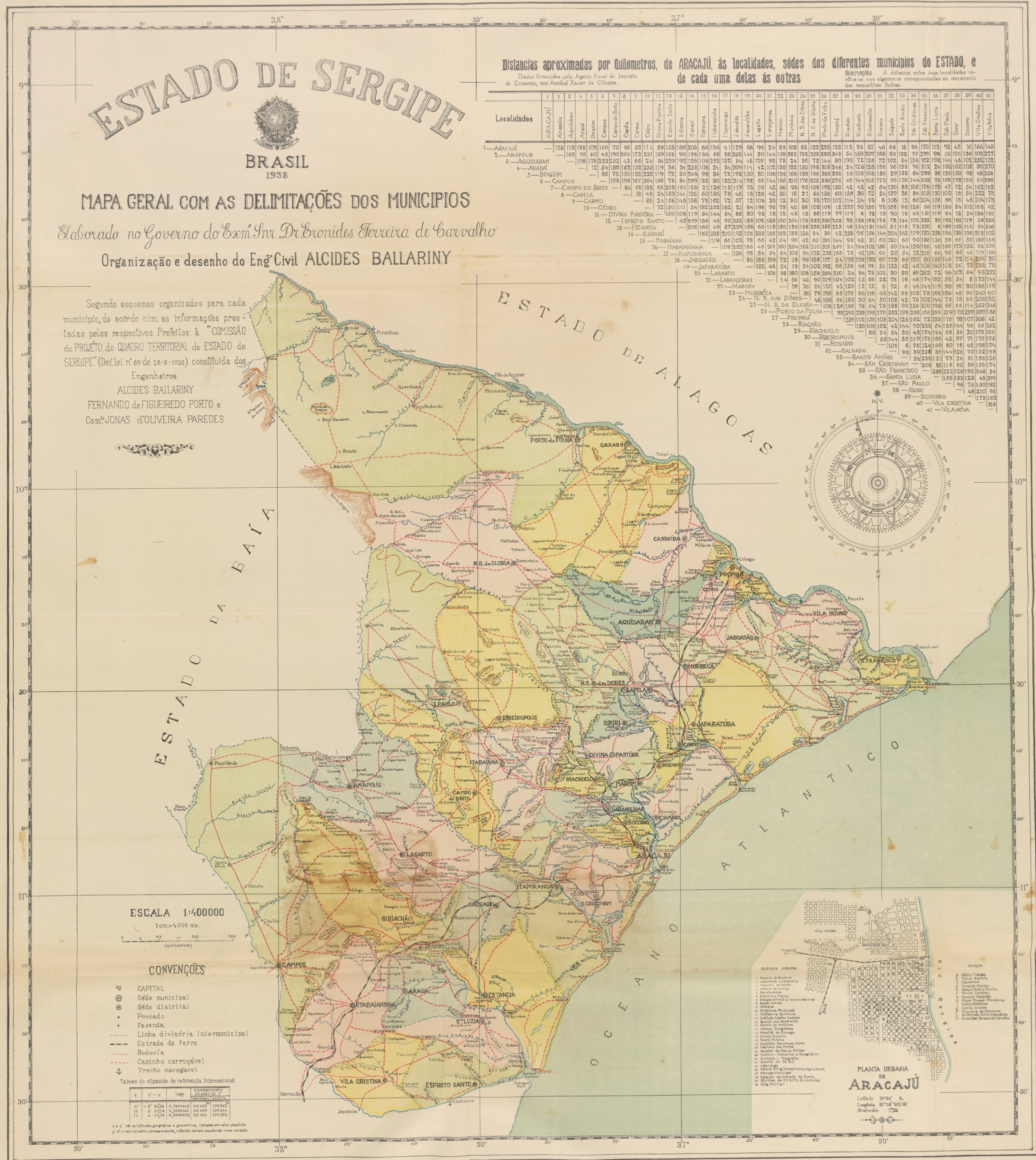 Mapa político do Estado de Sergipe. Departamento Nacional de Obras de Saneamento